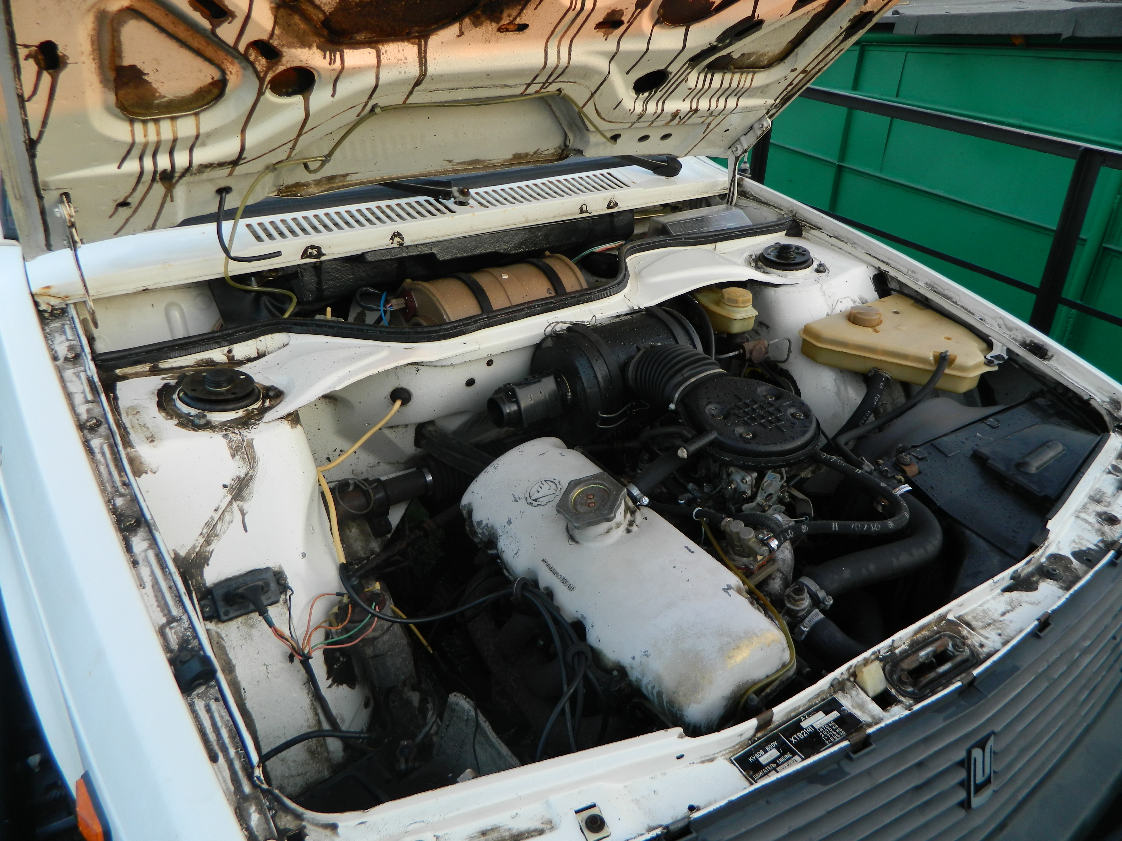 Двигатель УЗАМ 331 под капотом Москвич 2141 1989 года выпуска.